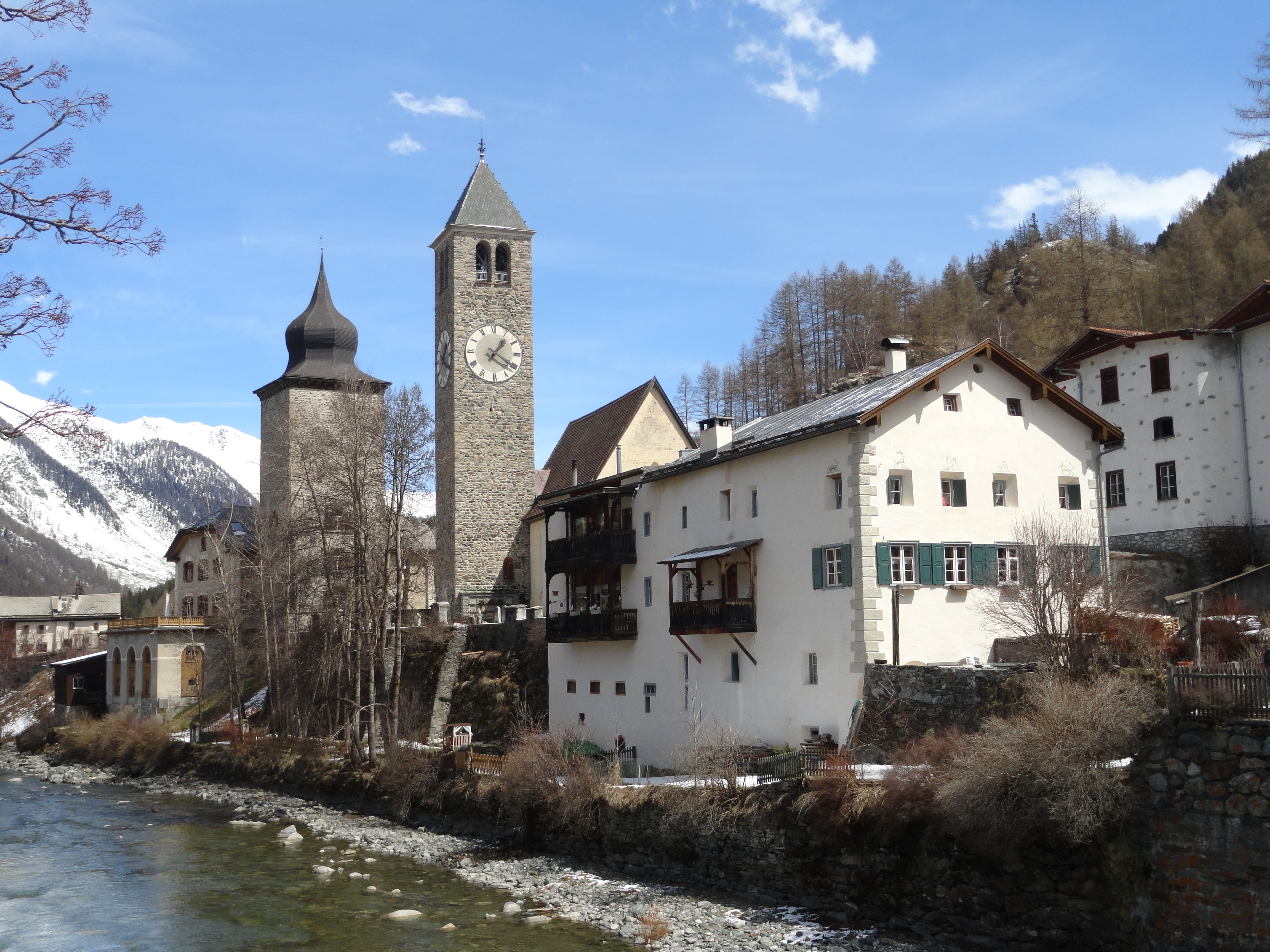 Reformierte Kirche Susch: rechts die Kirche, links der Plantaturm